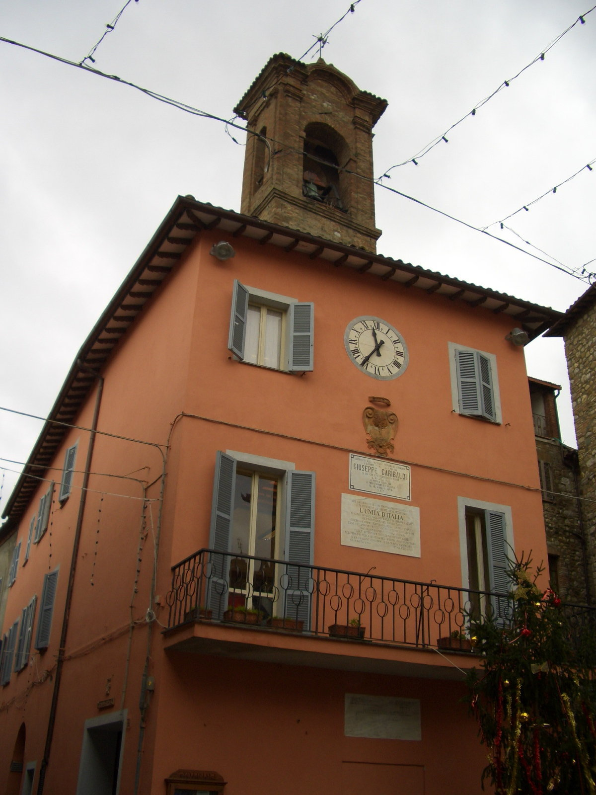 Ficulle, Palazzo Municipale (Town Hall)